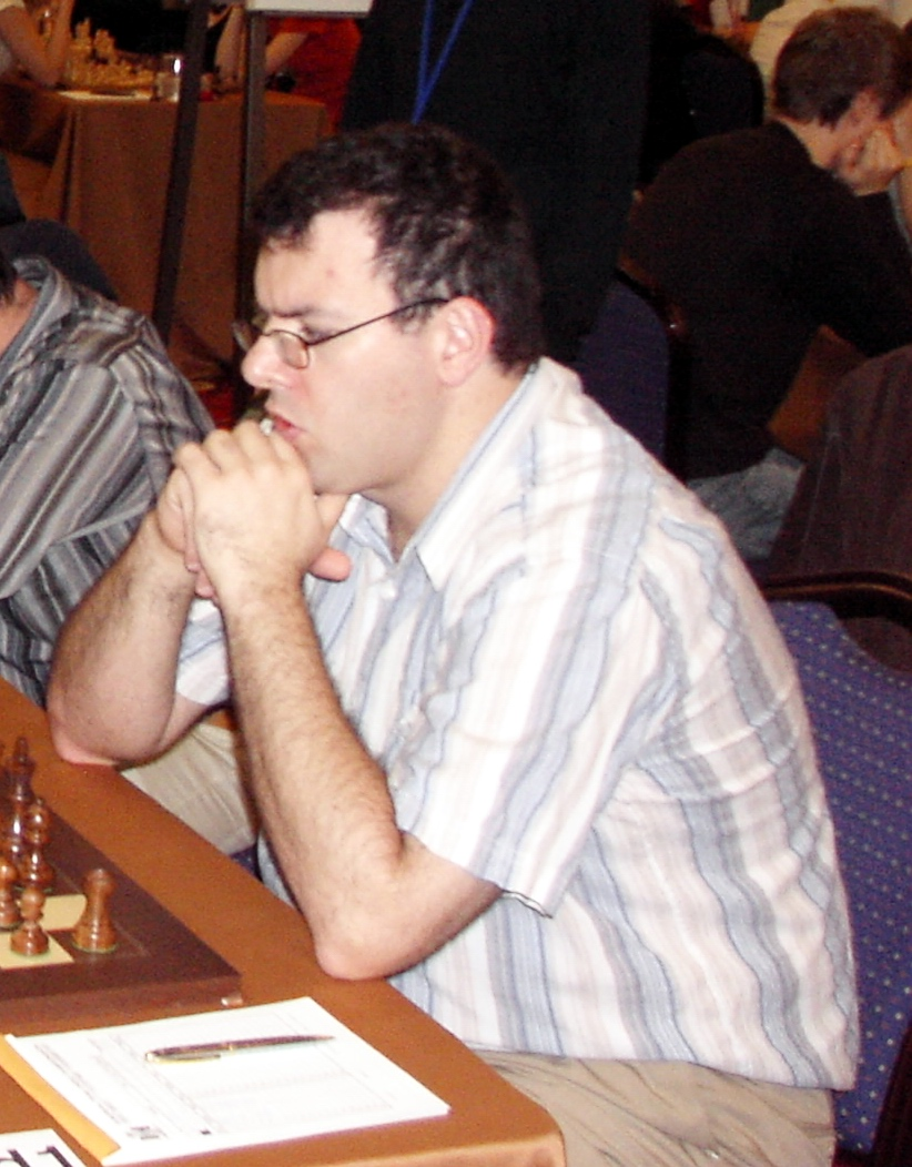 GM Emil Sutovsky Israel, EuroChess Iraklion 2007